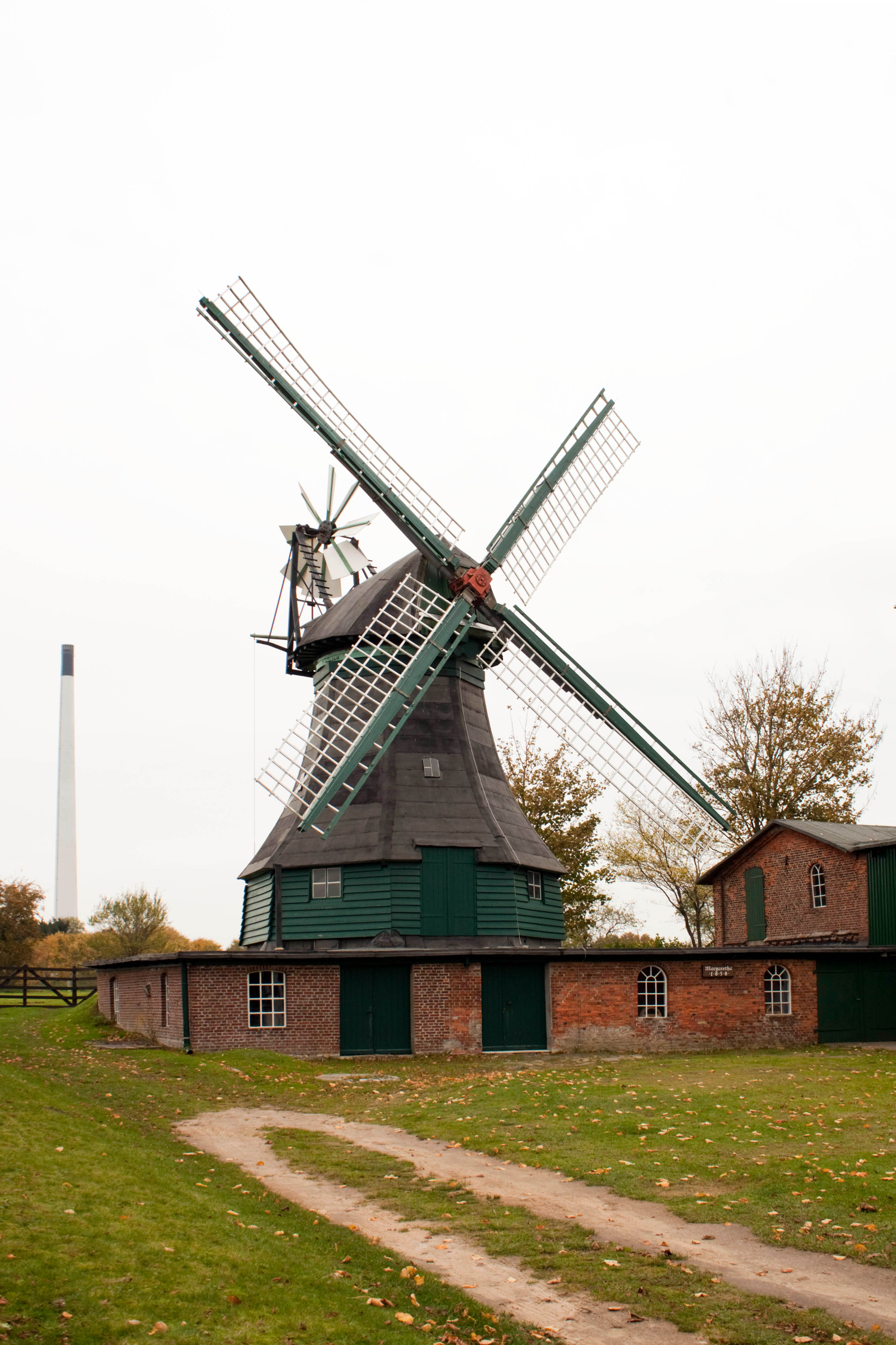 Historischen Kellerholländermühle "Magaretha", Bahnhofstraße 7 in Hemmingstedt ID 3094